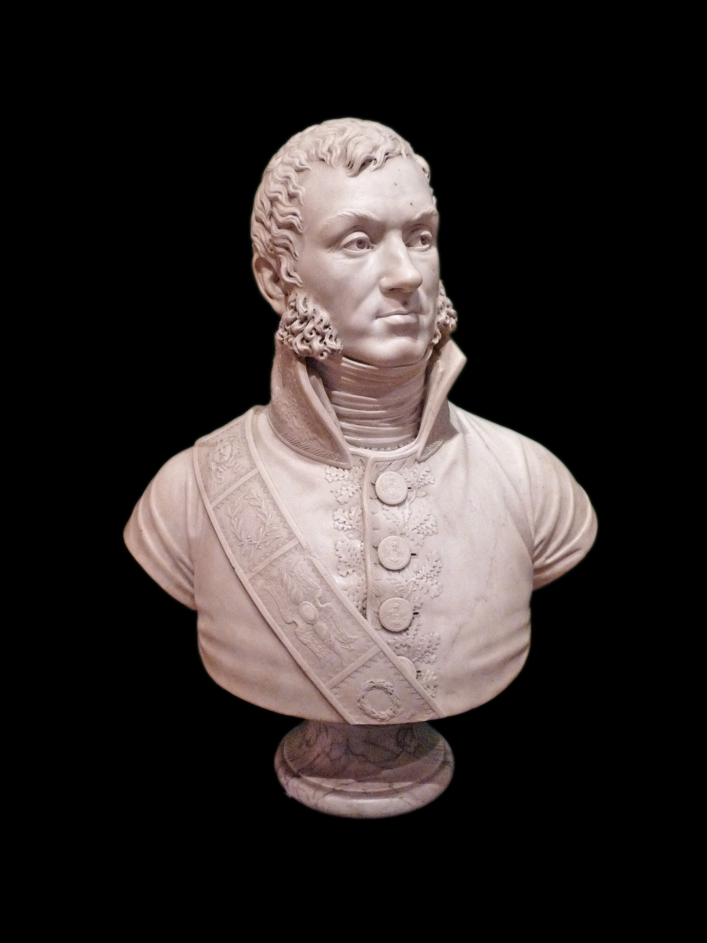 François [Le] Masson : Buste en marbre de Nicolas-Charles Oudinot. 1801-1802. Musée barrois (Bar-le-Duc).